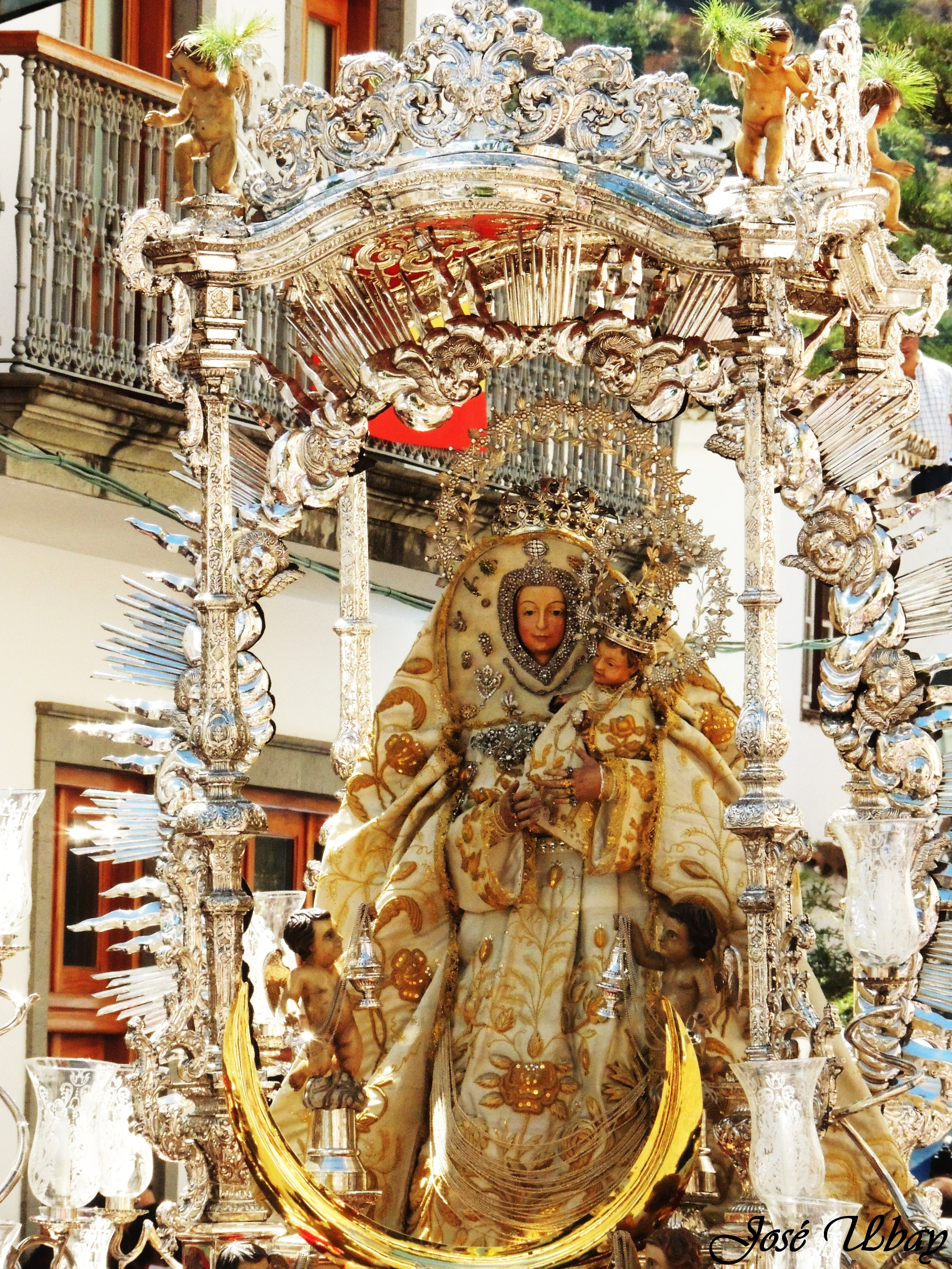 Nuestra Señora del Pino. Festividad 2013. Basílica de Nuestra Señora del Pino. Villa Mariana de Teror, Gran Canaria.